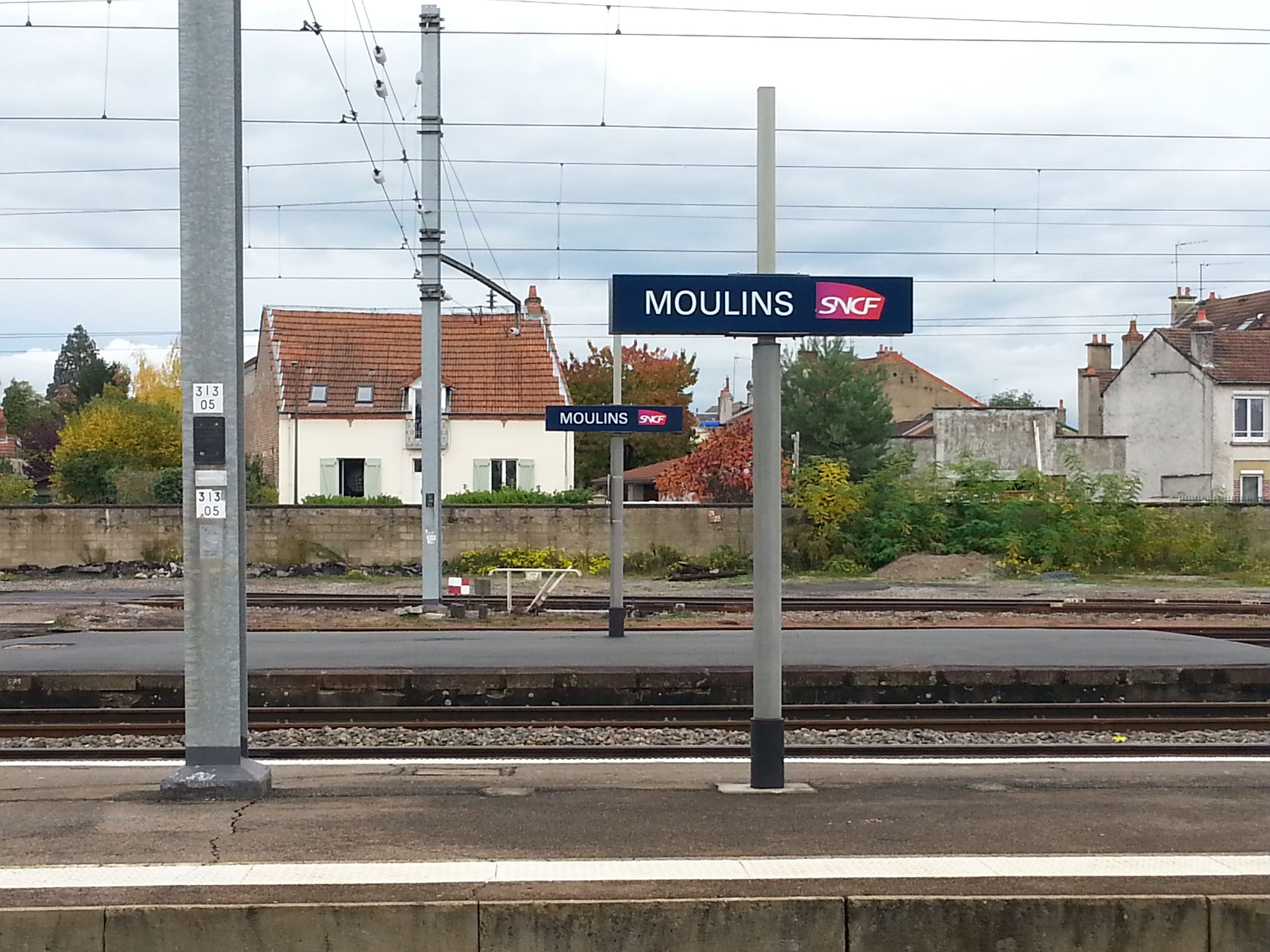 Quais de la gare de Moulins-sur-Allier.